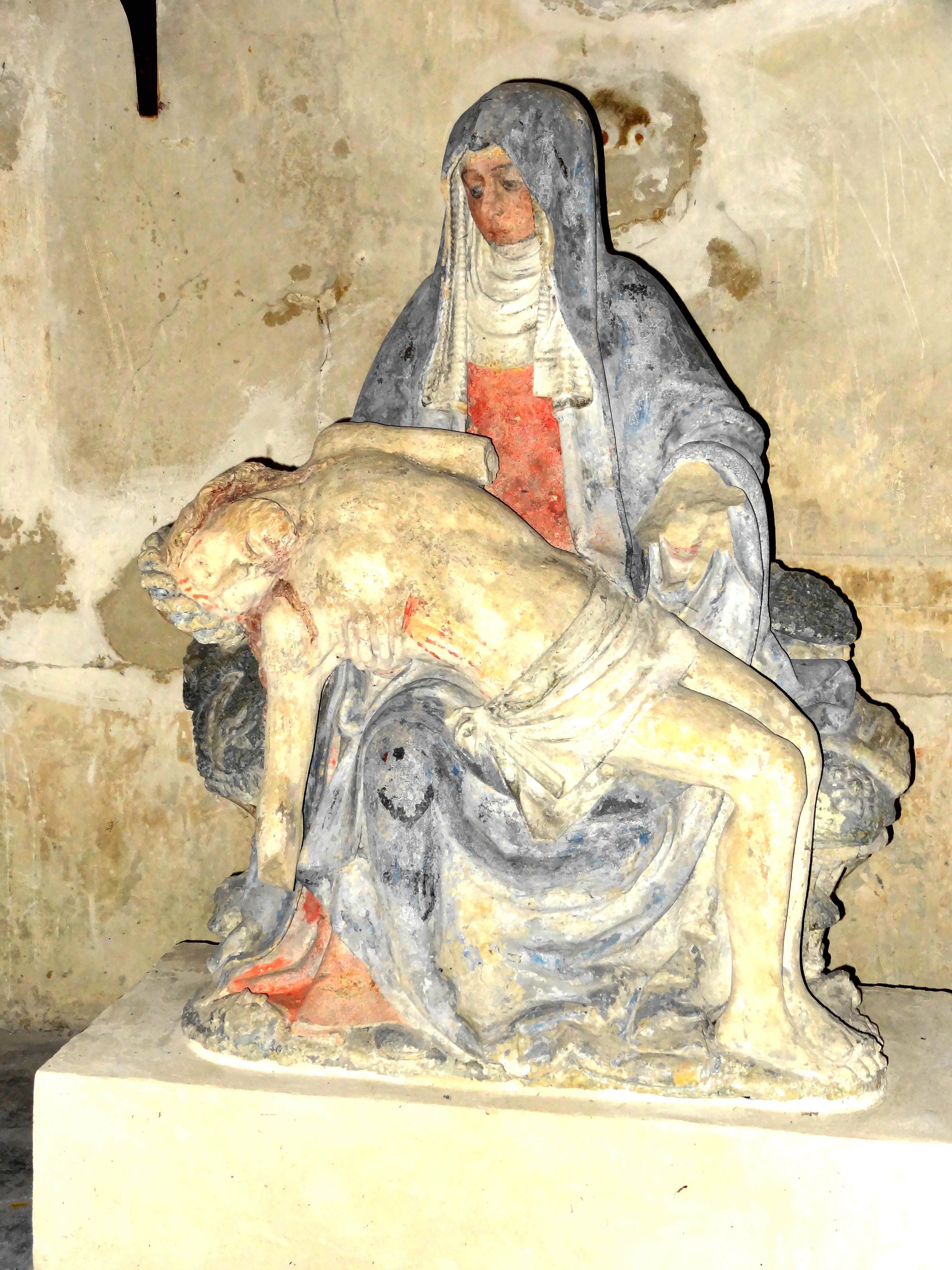 Mobilier de l'église - voir titre.